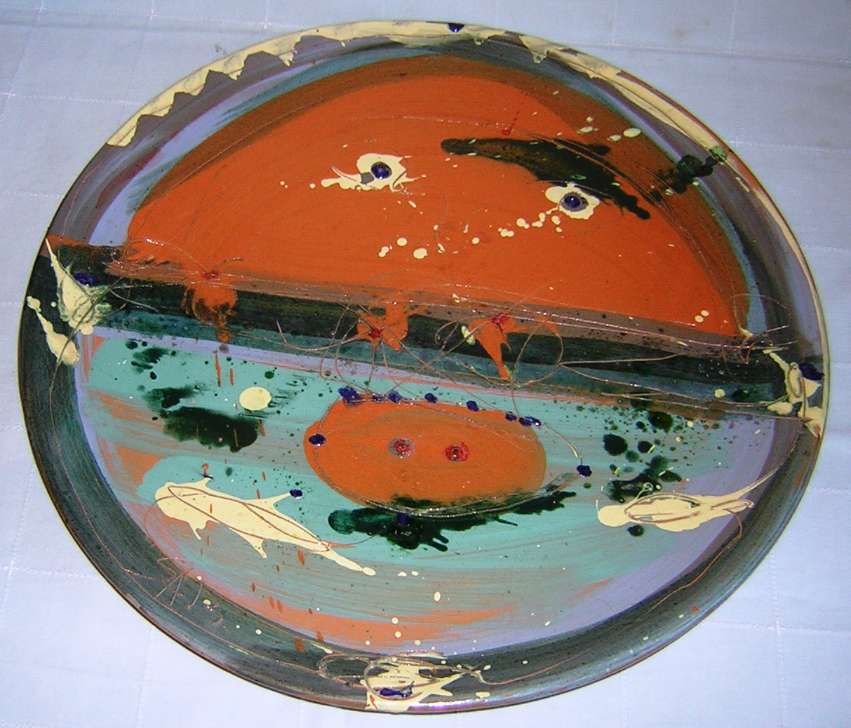 piatto in terracotta di diametro cm50 risalente presumibilmente agli anni '50; notevolissima testimonianza della sensibilità fantasiosa del maestro (in un classico soggetto di evocazione del mare) e delle capacità di sintesi cromo-formali